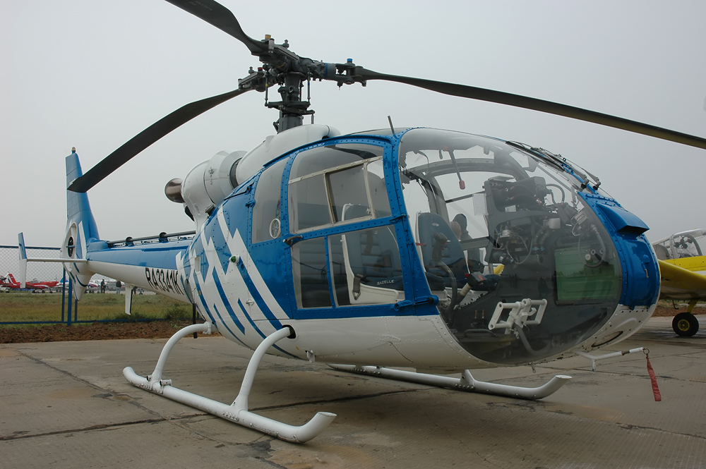 Sud-Aviation / Aérospatiale SA-341G Gazelle